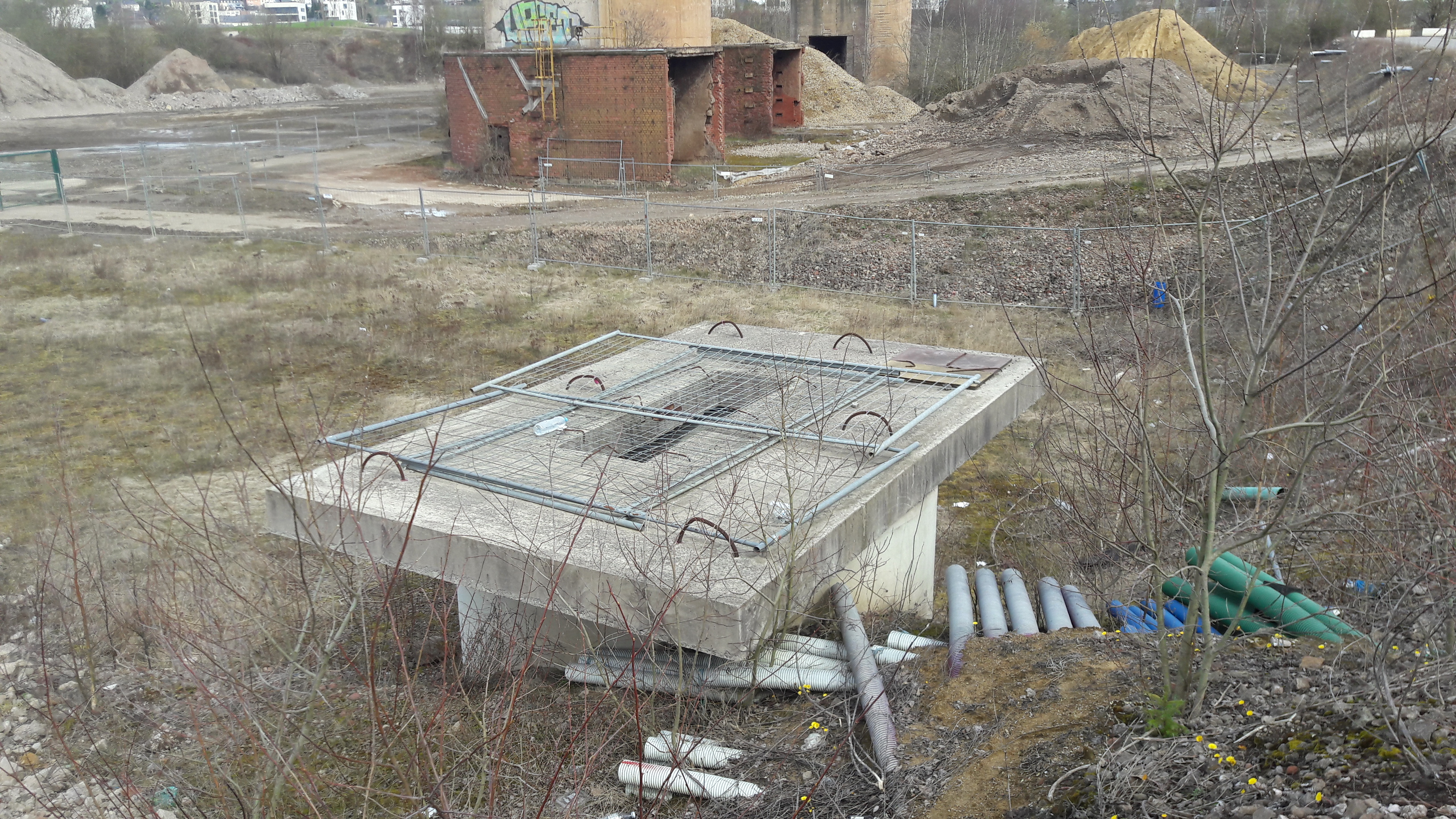 Déi a Bëtong gefasste Mineralwaasserquell Bel-val 2018